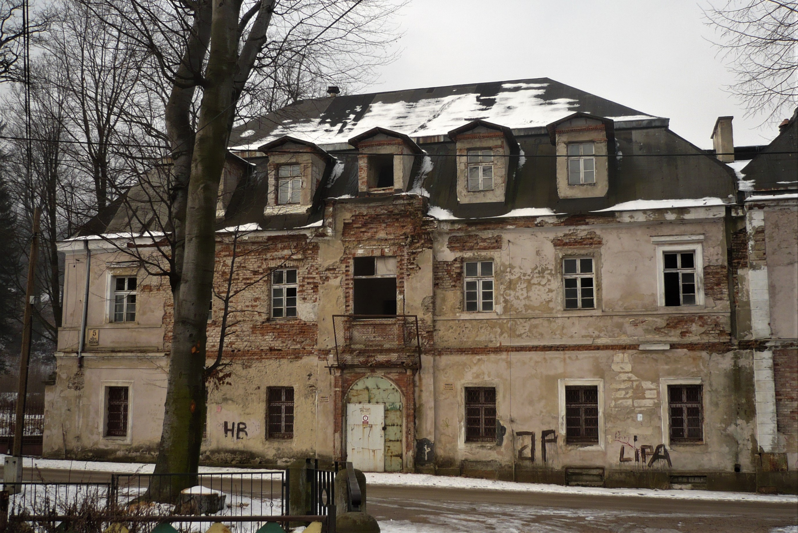 Walim, dwór, Piastowska 7, z XVIII w.